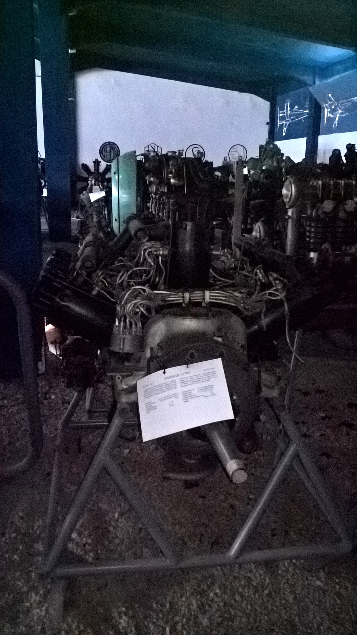 Francuski 12-cylindrowy silnik rzędowy Farman 12 We z 1924 r. ze zbiorów Muzeum Lotnictwa Polskiego w Krakowie.